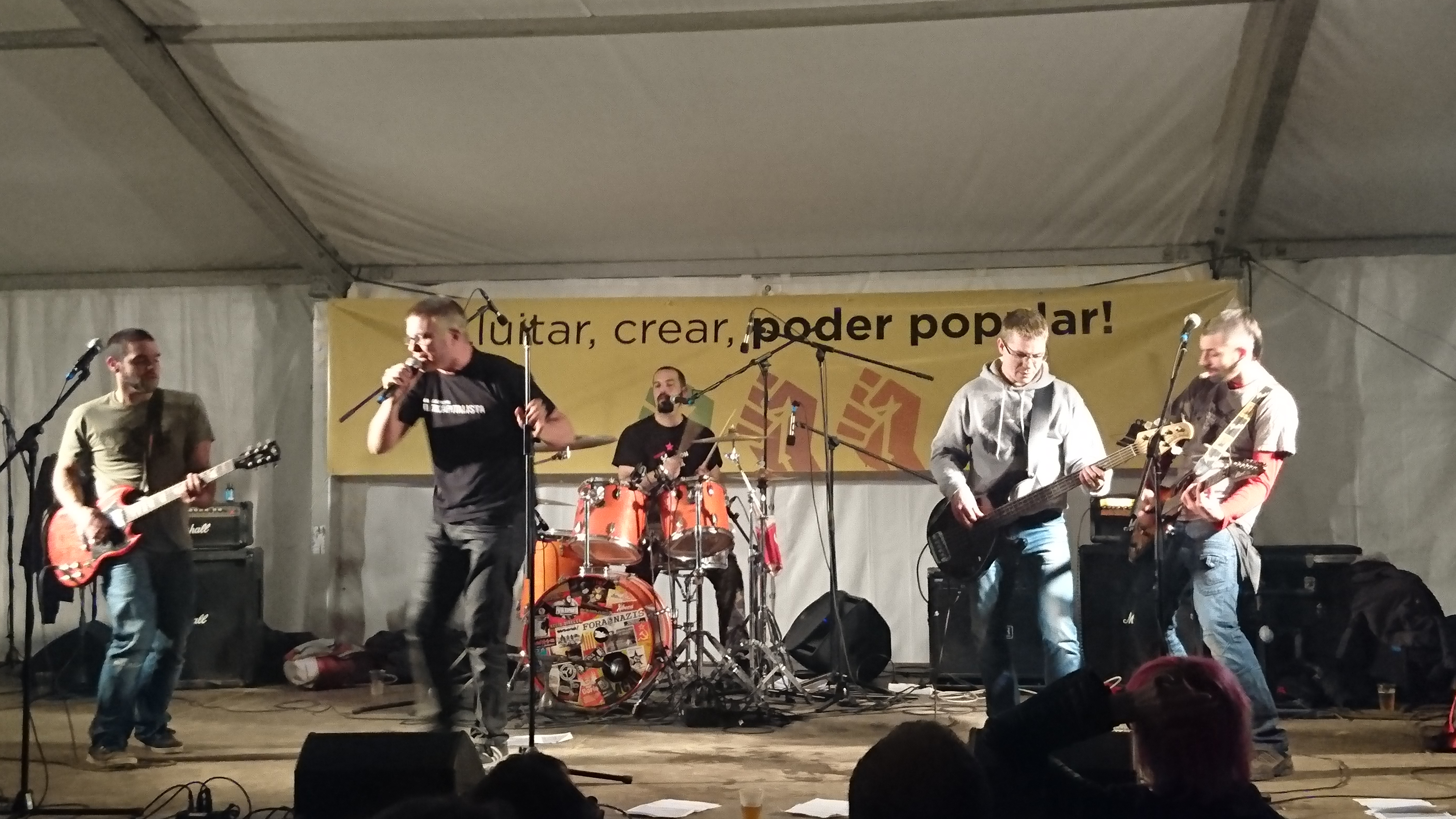 Concert del grup de rock combatiu Crit de lluita a les festes majors de 2015 de Sant Boi de Llobregat (Baix Llobregat, Països Catalans).